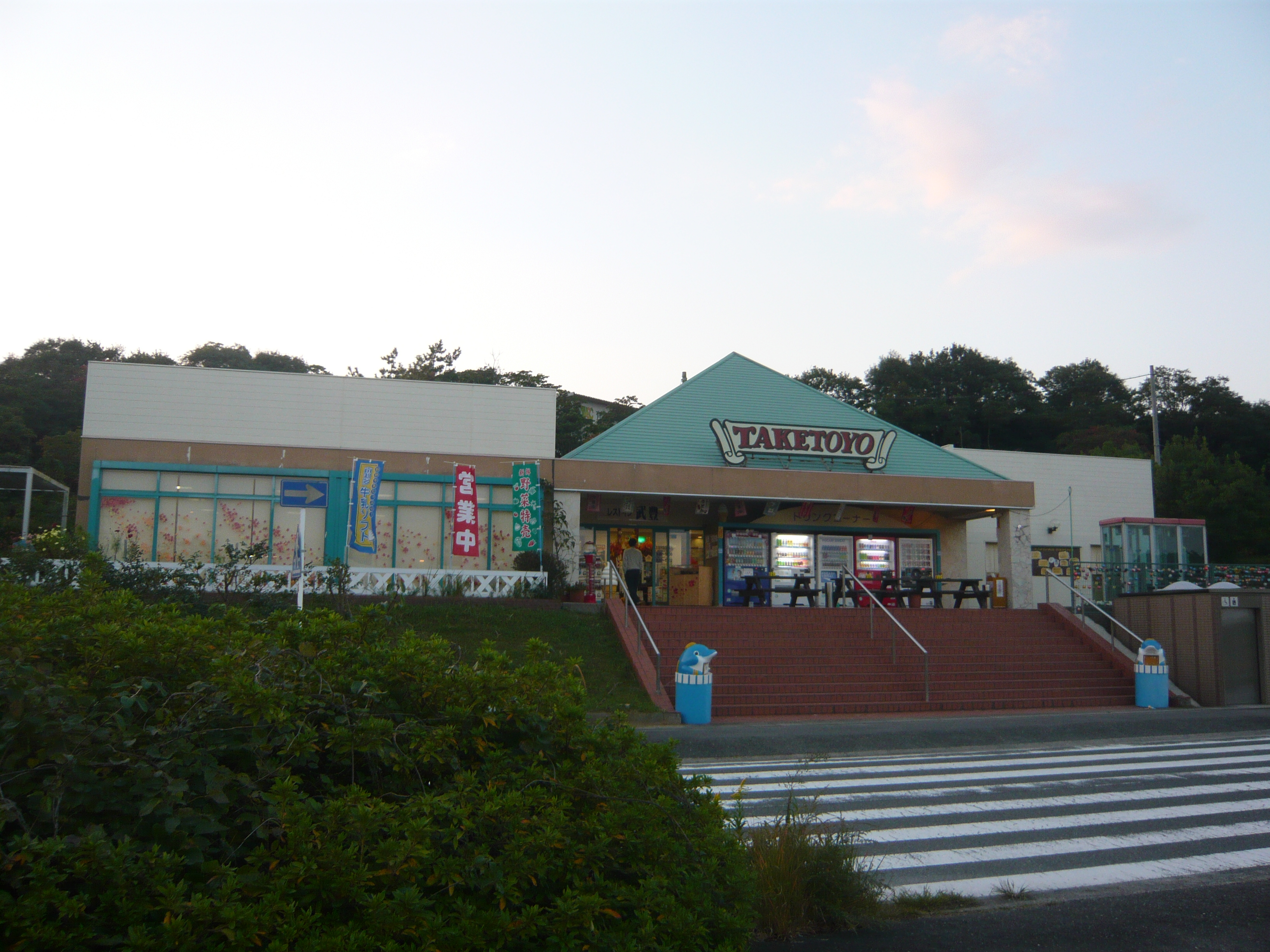 Taketoyo PA（武豊パーキングエリア）,Taketoyo,Aichi（愛知県知多郡武豊町）で撮影。